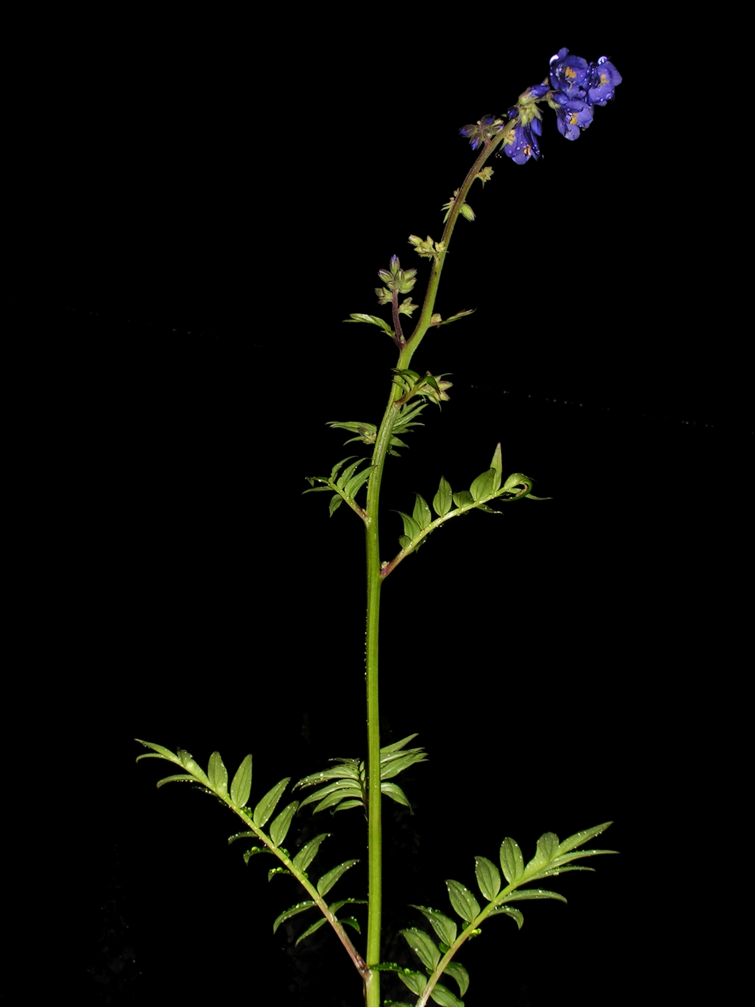 Polemonium caeruleum L. Moscow region, Russia.